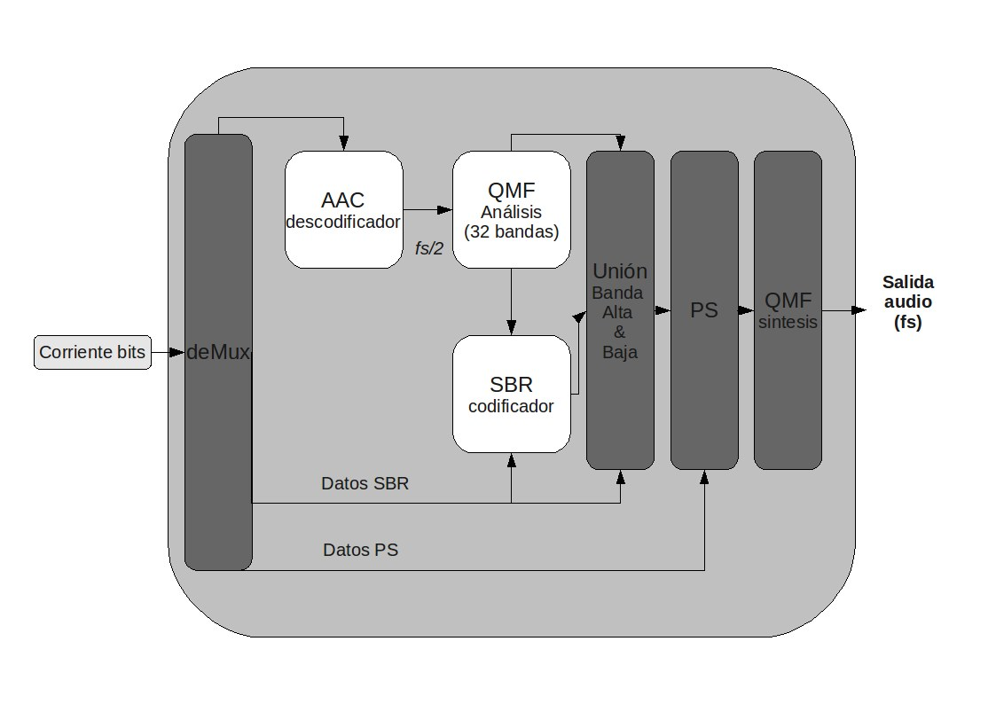 Descodificador de HE-AAC